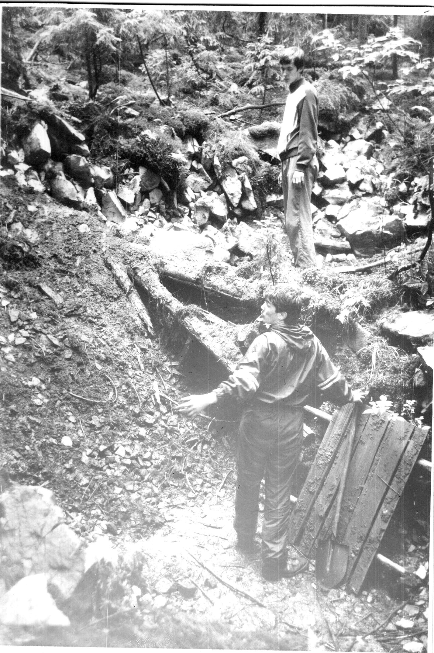 Внизу Олег Онисько – заступник керівника Малої Академії ремесел та етнографії стоїть на місці, де була «прихожа» криївки